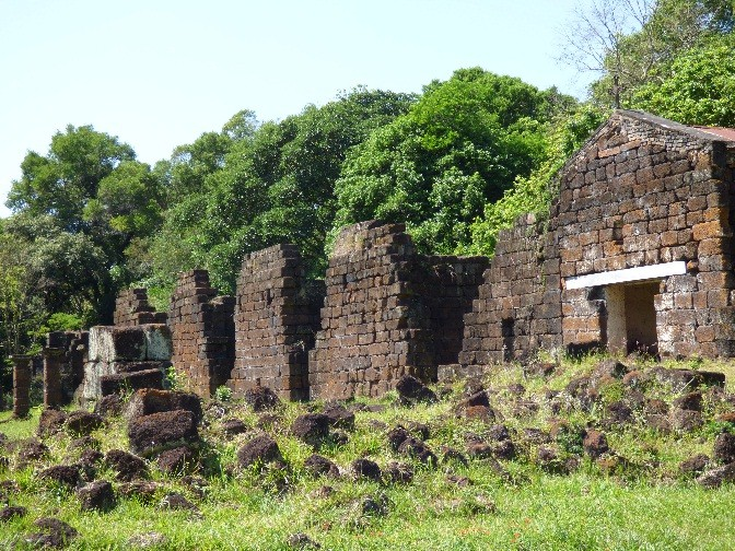 Capila y Habitaciones.